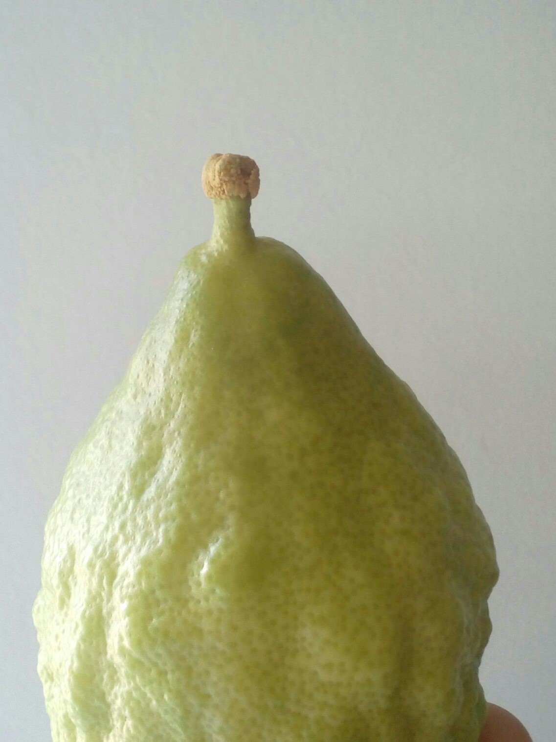 חוטמו (השיפוע העליון) של האתרוג כולל הפיטם והשושנתא שעליו